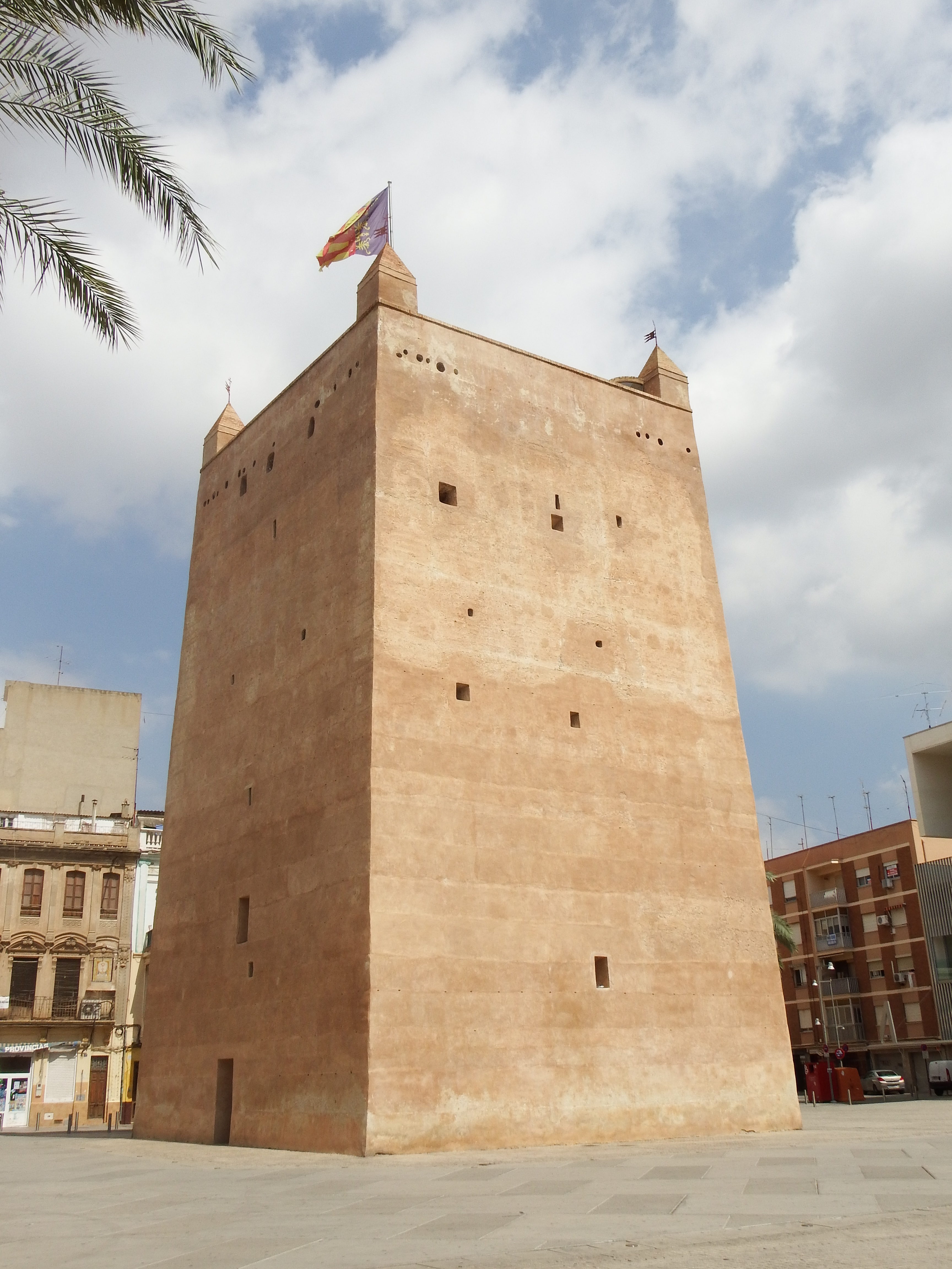 Torre árabe de Torrente